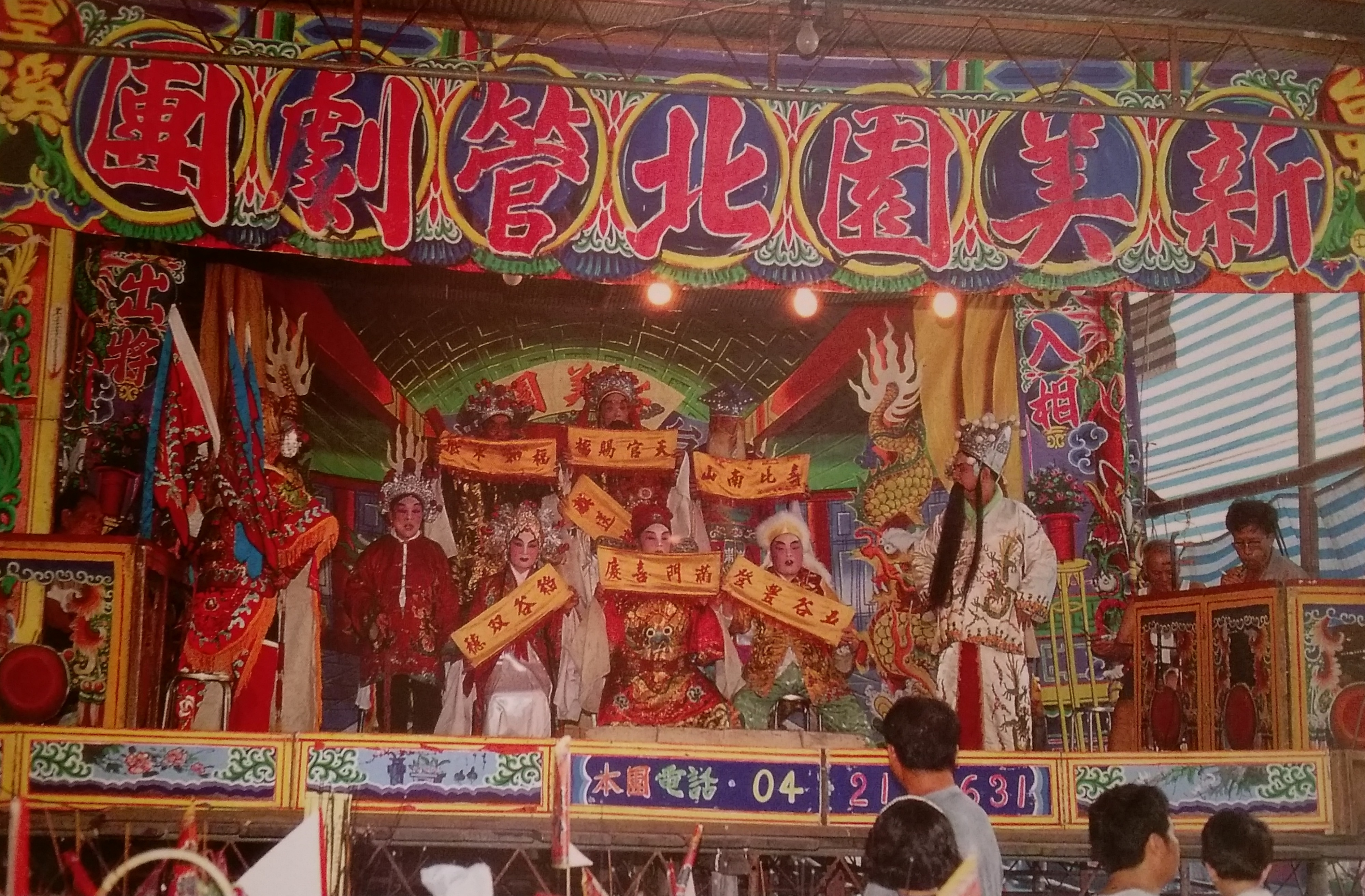 中文（台灣）: 新美園北管劇團演出扮仙戲